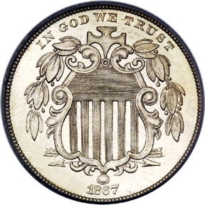 1867 Five Cents, Shield, Obverse